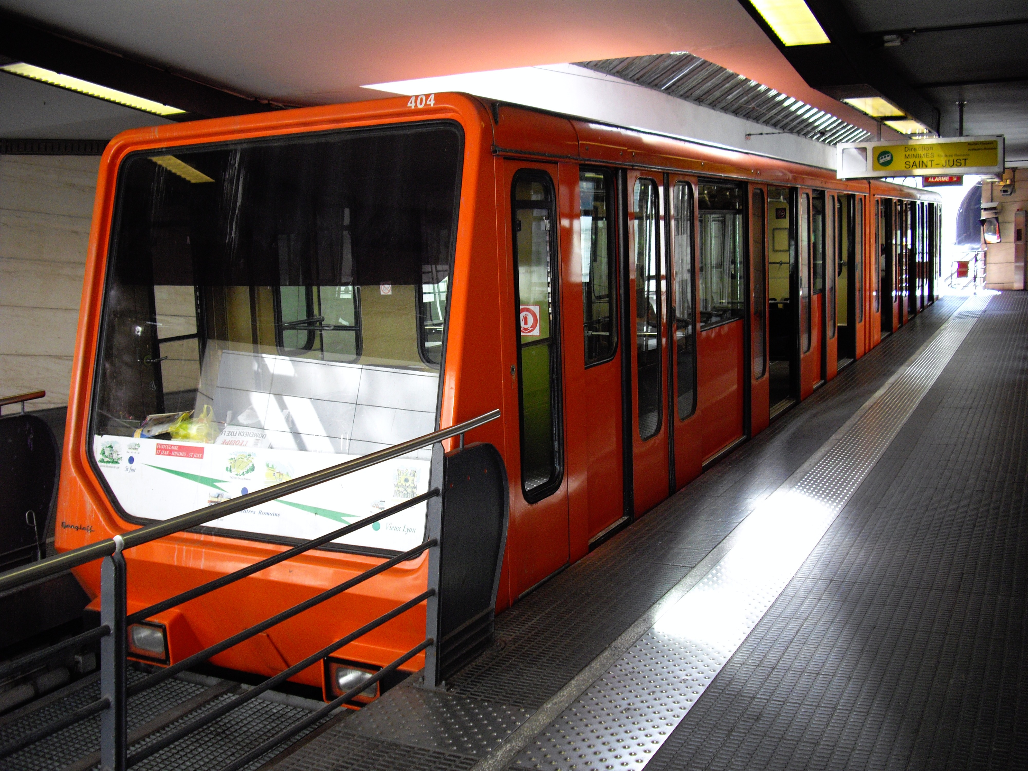 Le Funiculaire Saint-Just à la station Vieux Lyon Cathédrale Saint Jean